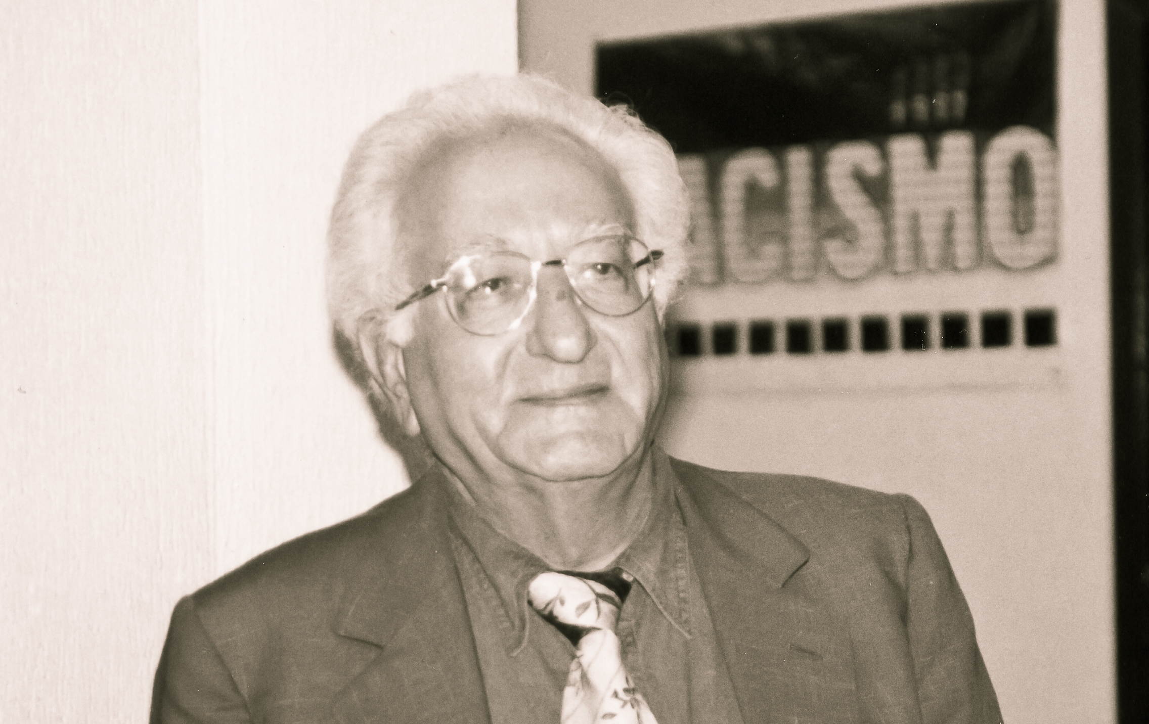 Giuseppe Tavani (Q3771510)